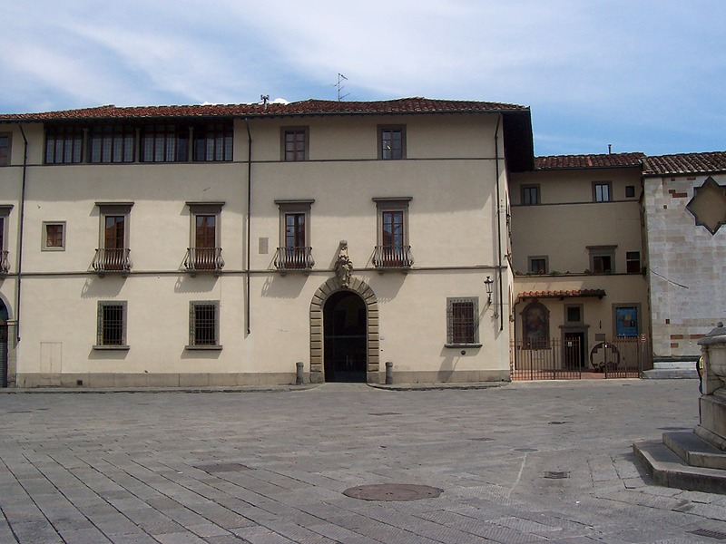 Prato - Palazzo Vescovile